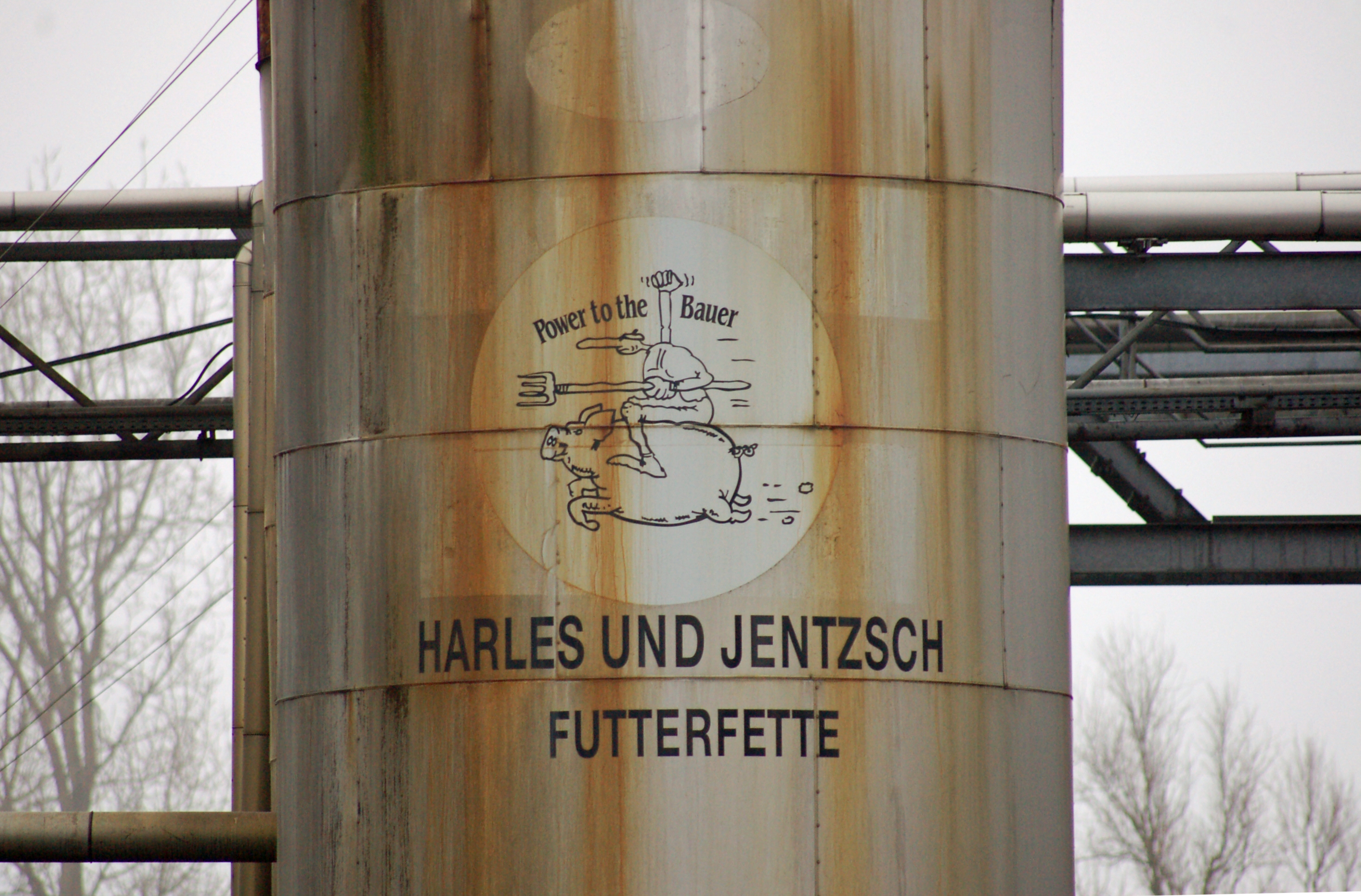 Tank mit Schriftzug der Firma Harles und Jentzsch in Uetersen, ein Spezialbetrieb für die Verarbeitung von tierischen und pflanzlichen Fetten und Ölen. Diese Firma sorgte im Dezember 2010 / Januar 2011 für einen der größten Dioxinskandale in Deutschland.